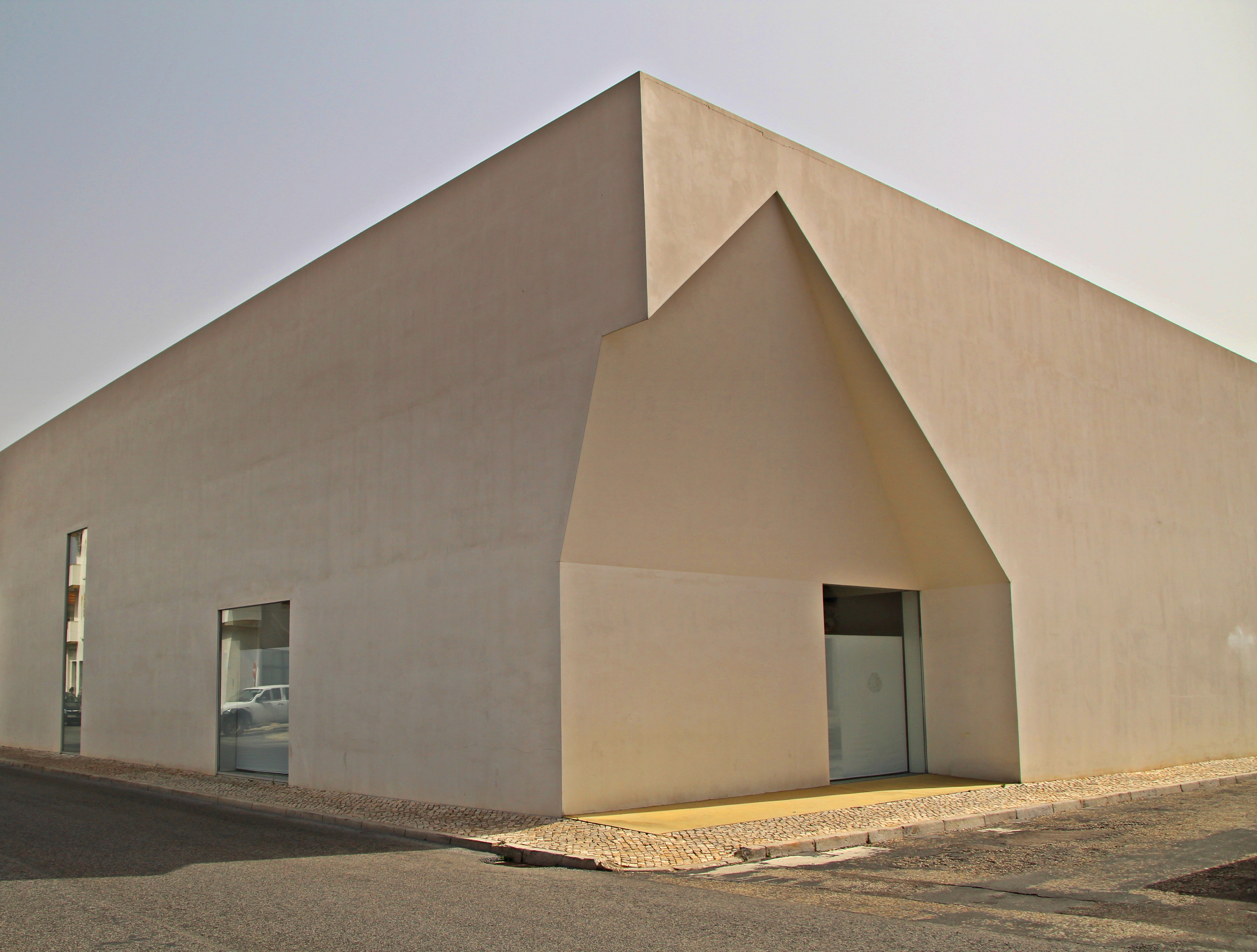 Comunity Center en Grándola, el Algarve